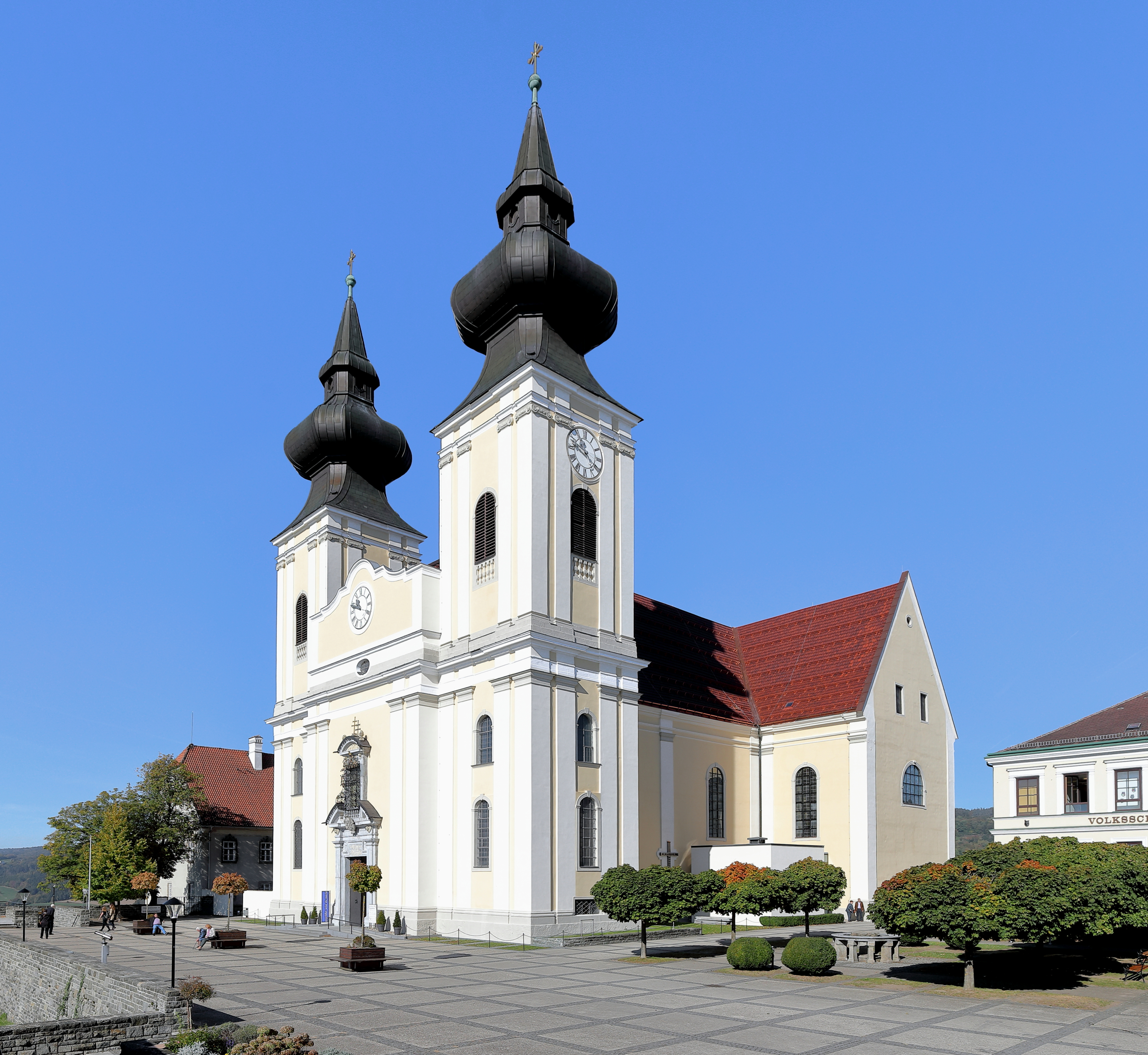 Ostsüdostansicht der Wallfahrtskirche Maria Taferl in der niederösterreichischen Marktgemeinde Maria Taferl. Die Wallfahrtskirche wurde ab 1660 errichtet und 1724 geweiht. Ab 2004 fand eine Generalsanierung in Etappen statt, die im Herbst 2018 abgeschlossen wurde.